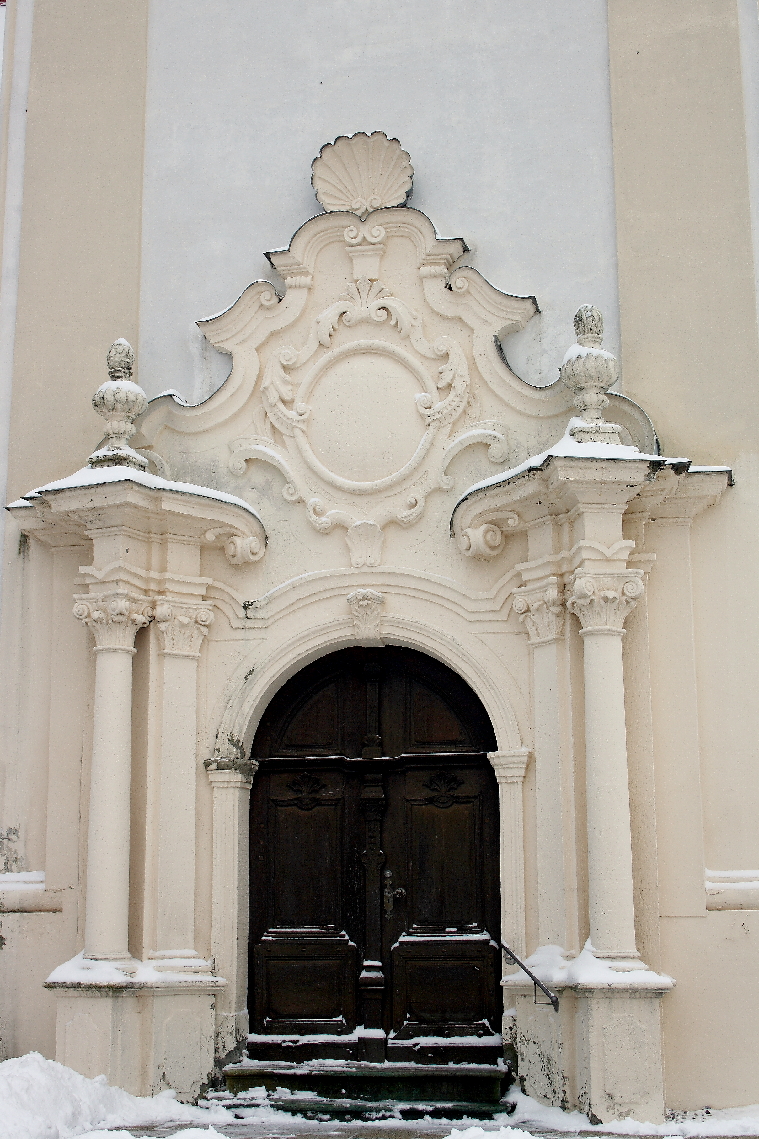 Katholische Pfarrkirche, ehemalige Kloster- und Wallfahrtskirche St. Leonhard in Unterliezheim, einem Ortsteil von Lutzingen im Landkreis Dillingen an der Donau (Bayern), Portal